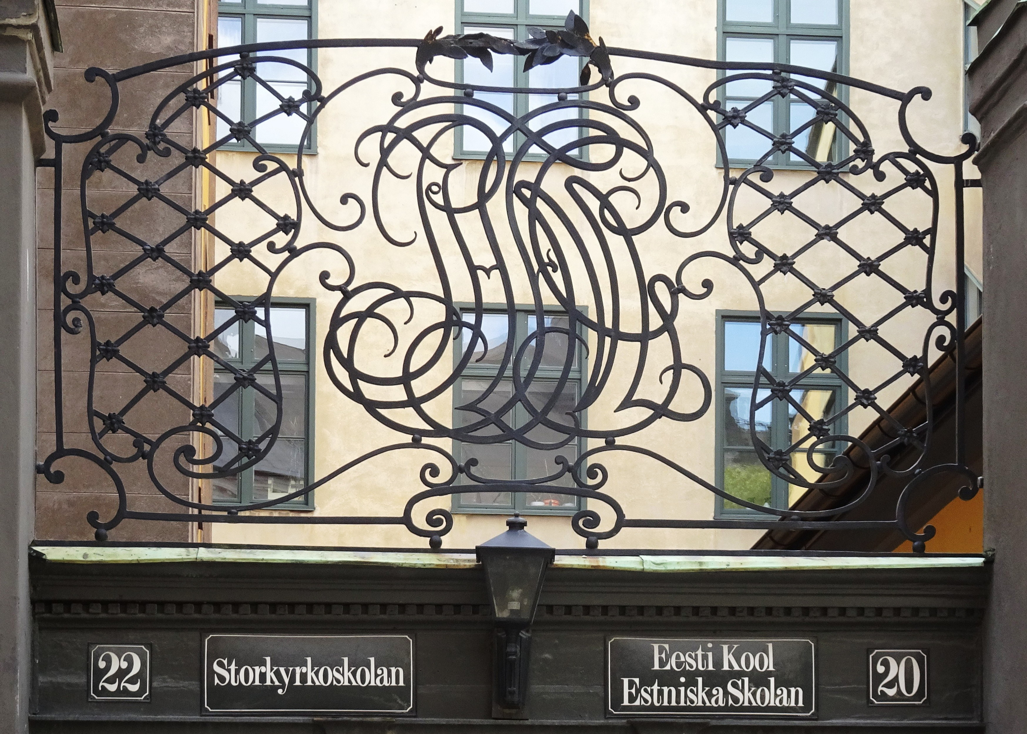 Portöverstycke i smide (Svartmangatan 20-22) med Peter Heinrich Fuhrmanns och Margarete Götze initialer (P H F M G)